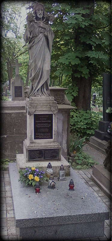 Могила Зигмунта Гораздовского (1845—1920) — блаженного Римско-Католической Церкви, польского священика на Лычаковском кладбище (Львов).